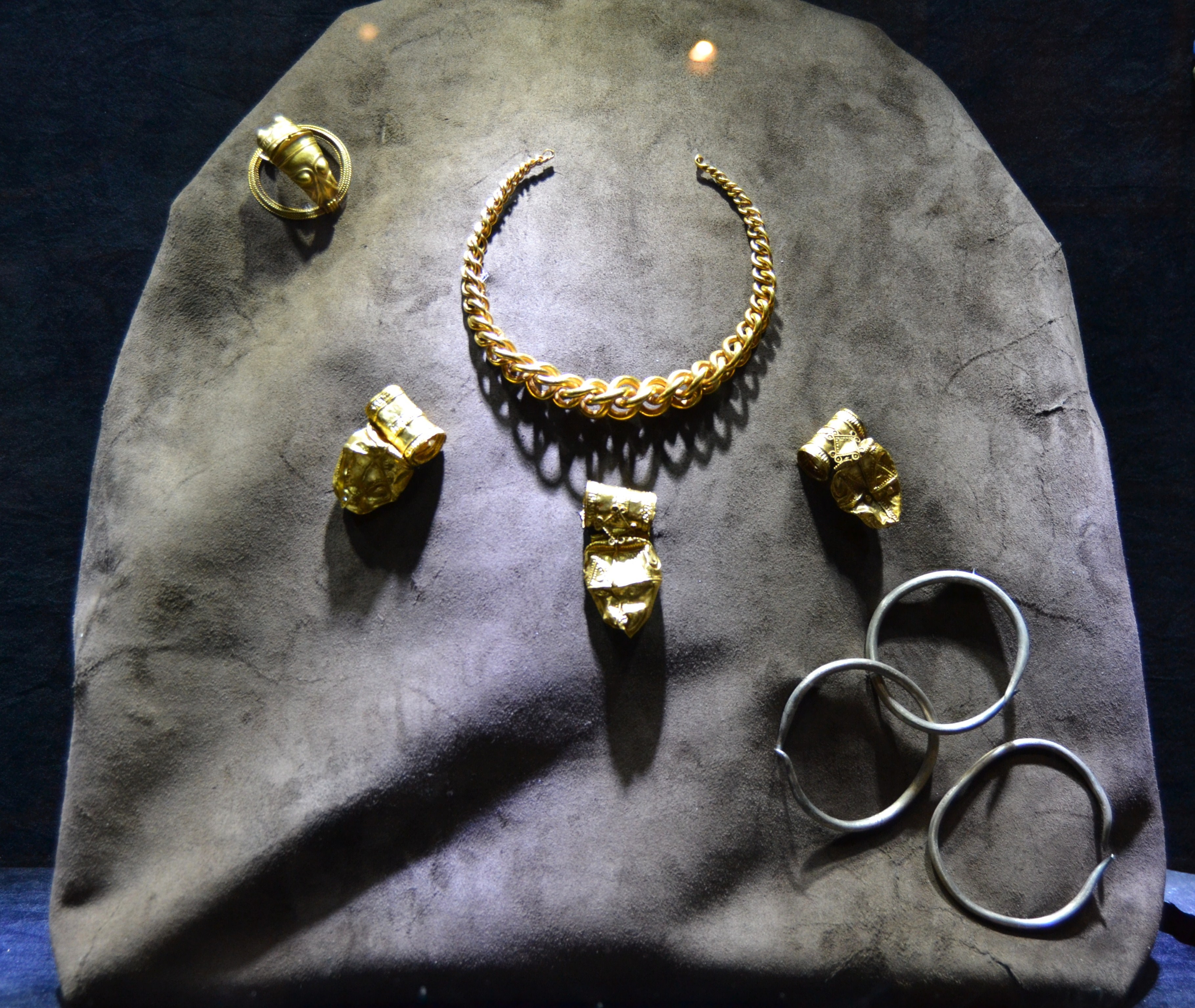 Tresor ibèric de Xest, s. II aC, Museu d'Història de València.